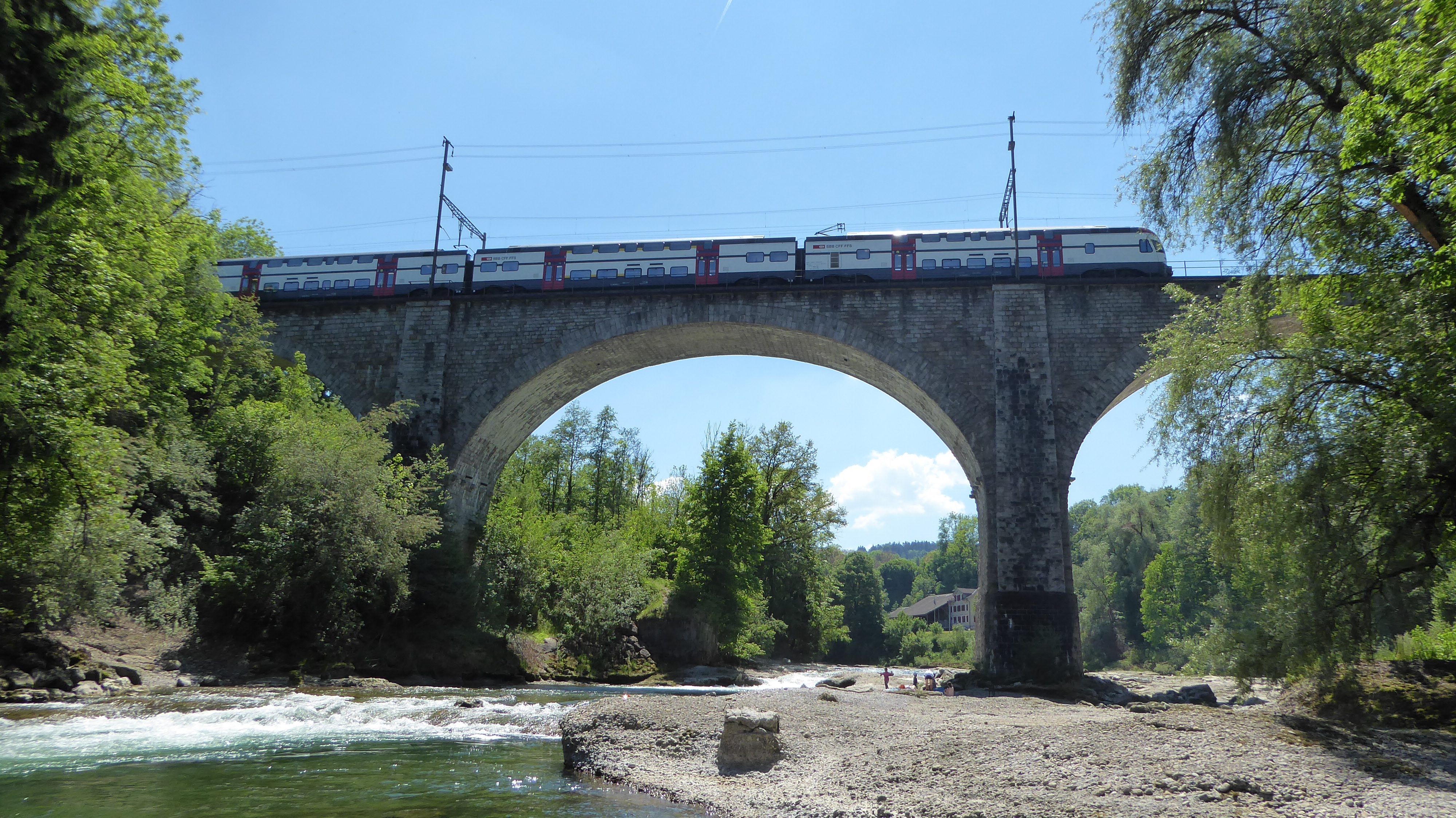 Thurbrücke Schwarzenbach der SBB mit RABe 511 als Rheintal-Express REX 4975 Wil–St. Gallen–Chur